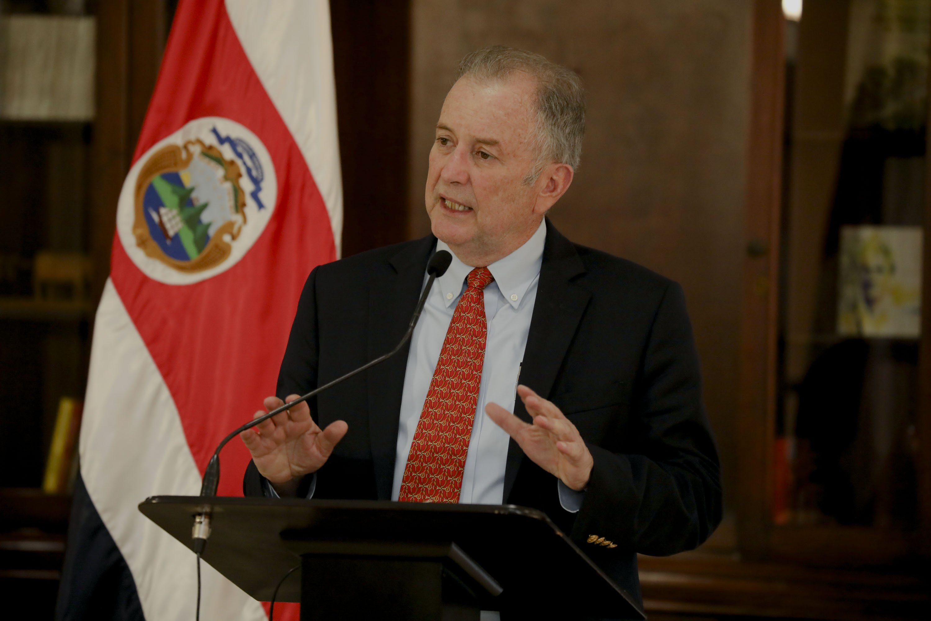 Ottón Solís en conferencia de prensa, 2019